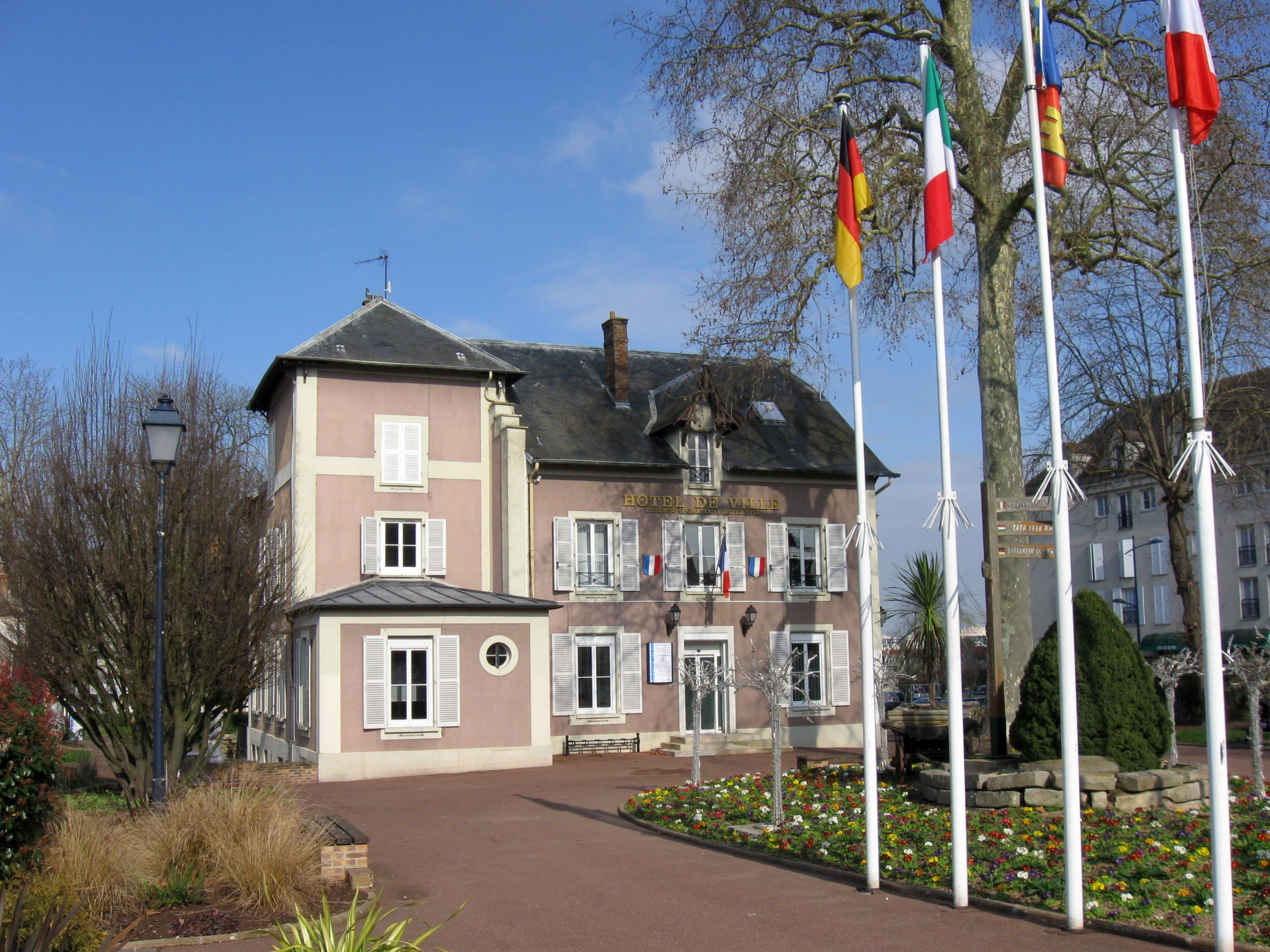 Mairie de Dammarie-les-Lys. (Seine-et-Marne, région Île-de-France).